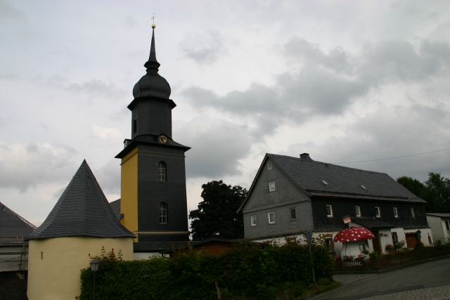 Geroldsgrün, Kirchenensemble